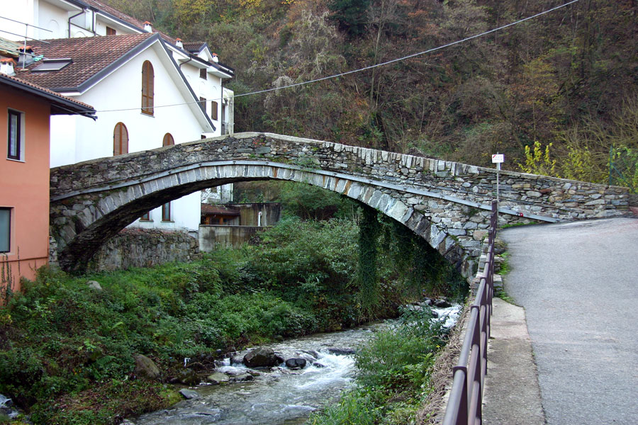 Il ponte a schiena d'asino sul fiume Pellino a Pella (NO) datato 1578